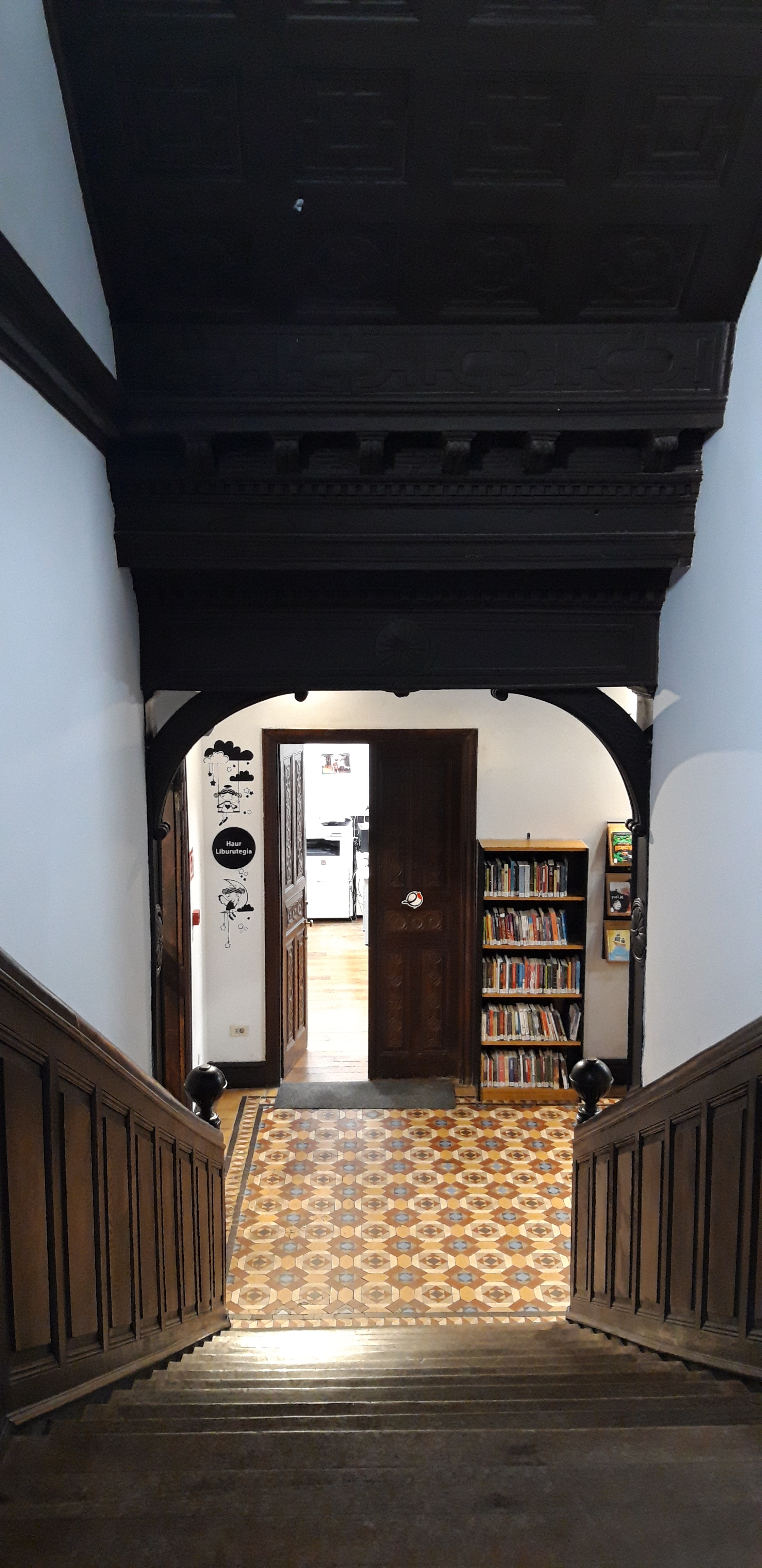 Eskailera gaineko egurrezko sabaia moldurez dekoratuta dago